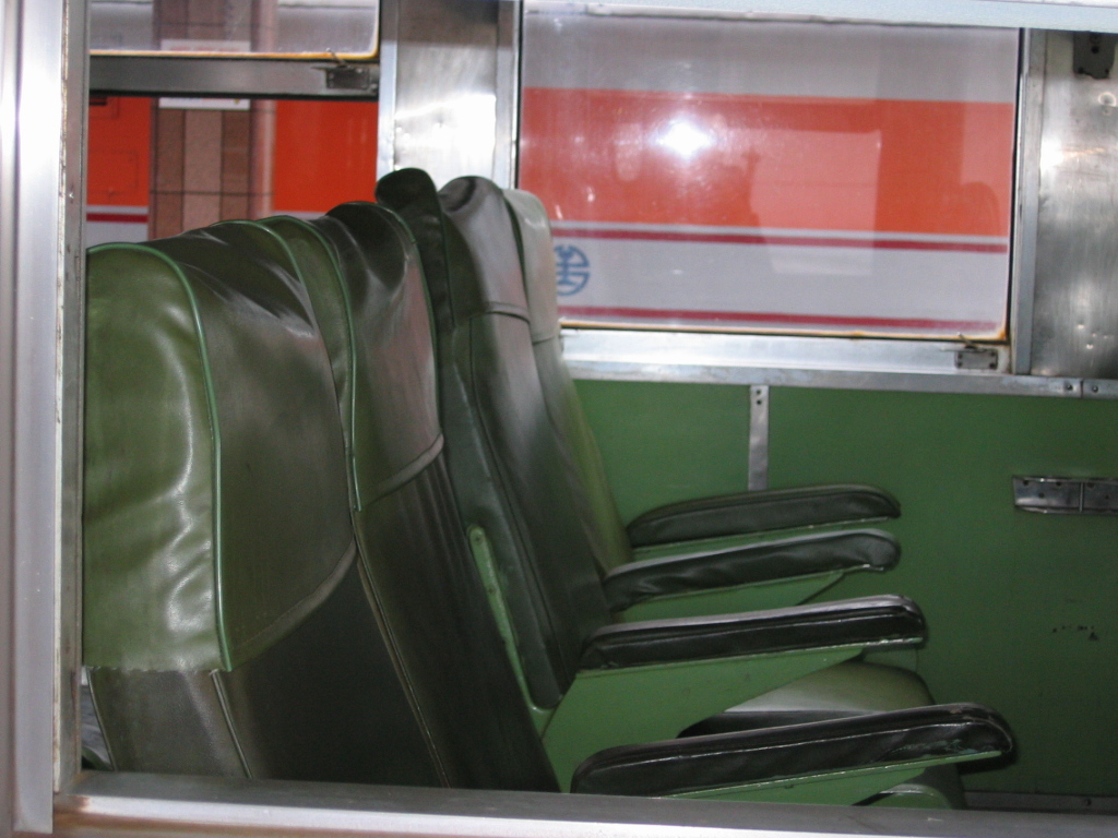 中文（台灣）: 此檔案為本人親自攝影